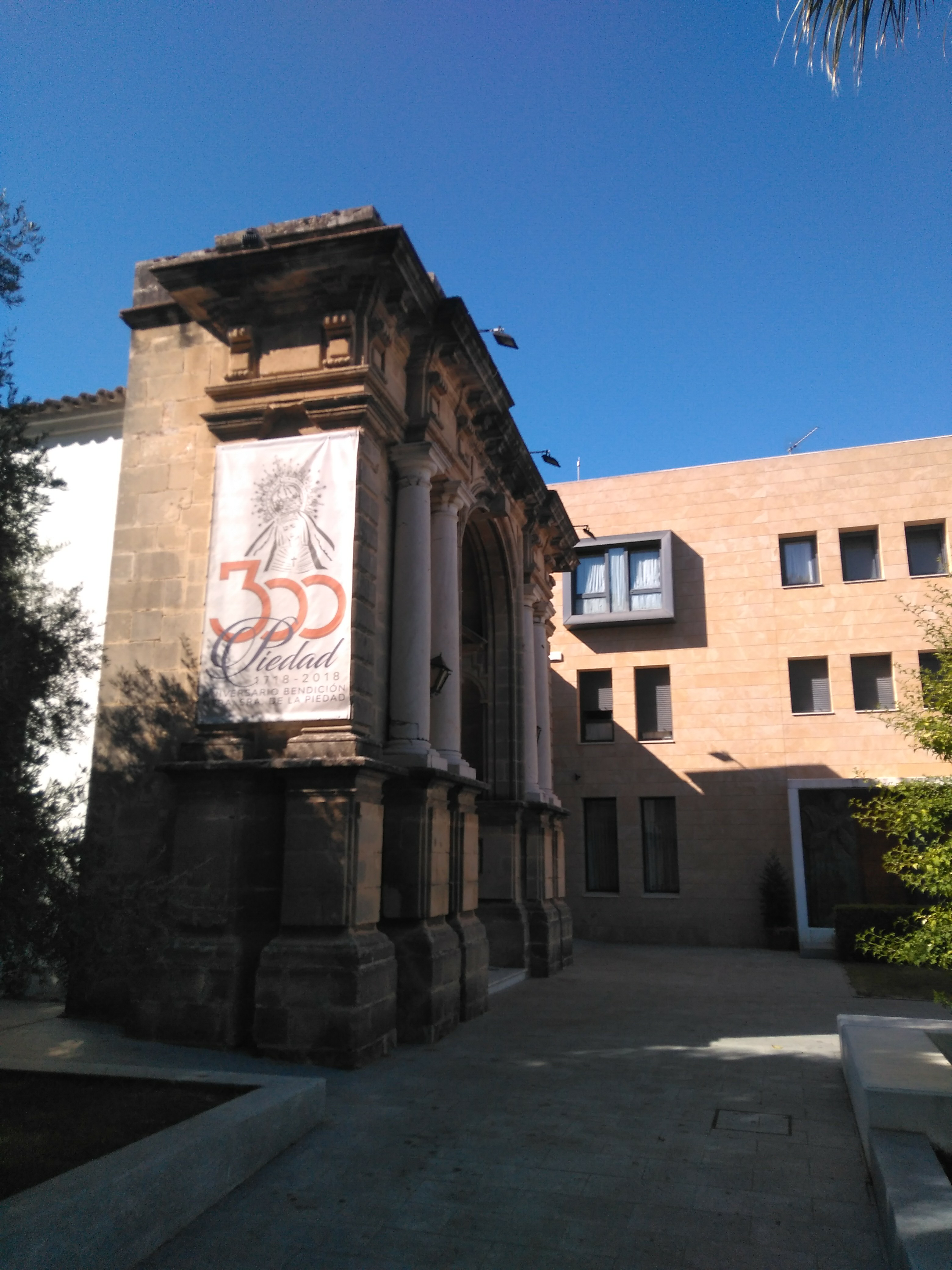 Capilla del Calvario (Jerez de la Frontera, España)